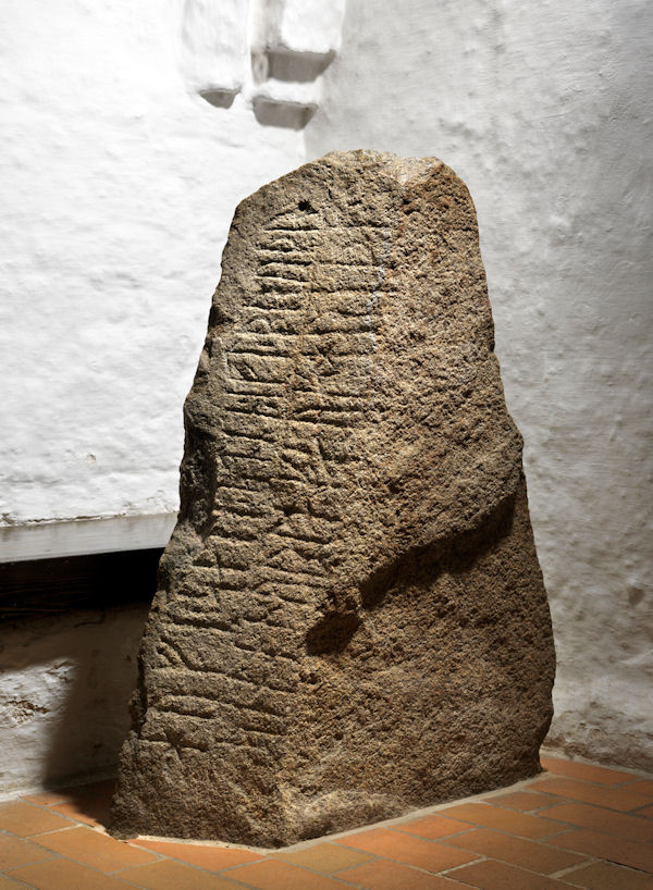 Foto af Roberto Fortuna 2012